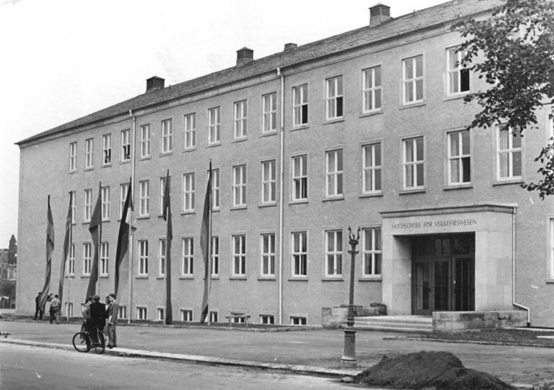 Dresden, Hochschule für Verkehrswesen Zentralbild Höhne-Pohl 9.9.1952 Die erste Spezialhochschule in der Geschichte des deutschen Hochschulwesens in Dresden eröffnet. Am 8.9.1952 wurde die Hochschule für Verkehrswesen, die aus einer bisherigen Fakultät der Technischen Hochschule Dresden hervorging, im Beisein von Minister Reingruber, des Stellvertreters des Ministerpräsidenten Otto Muschko und des Volkskammerpräsidenten Dieckmann feierlich eröffnet. In vier Studienjahren werden auf dieser Hochschule Verkehrstechniker und Wissenschaftler ausgebildet, die dann später auf allen Gebieten des Verkehrswesens arbeiten werden. UBz: Der Bau der neuen Hochschule für Verkehrswesen im Hochschulviertel in Dresden.